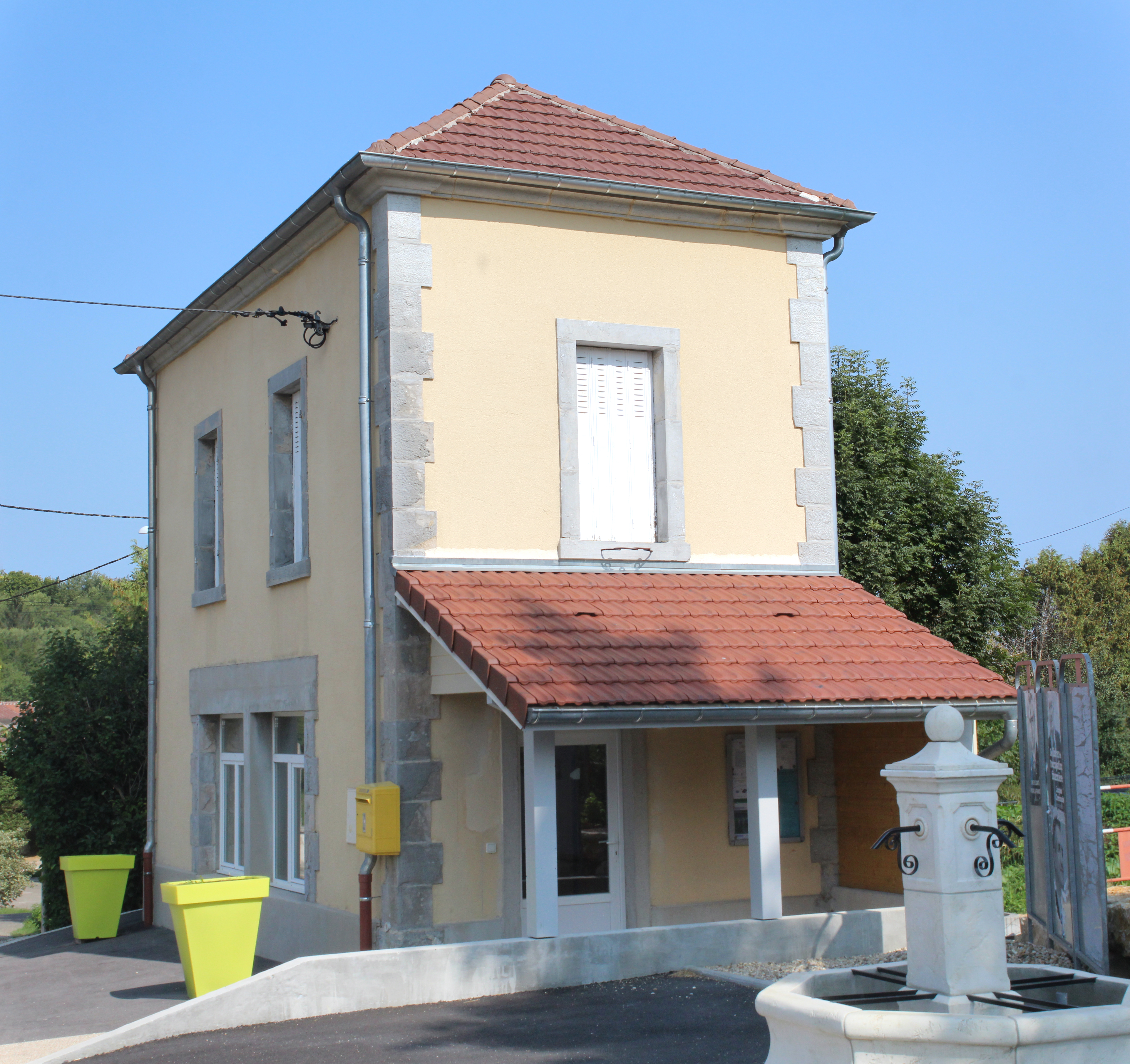 Mairie de Montmarlon.